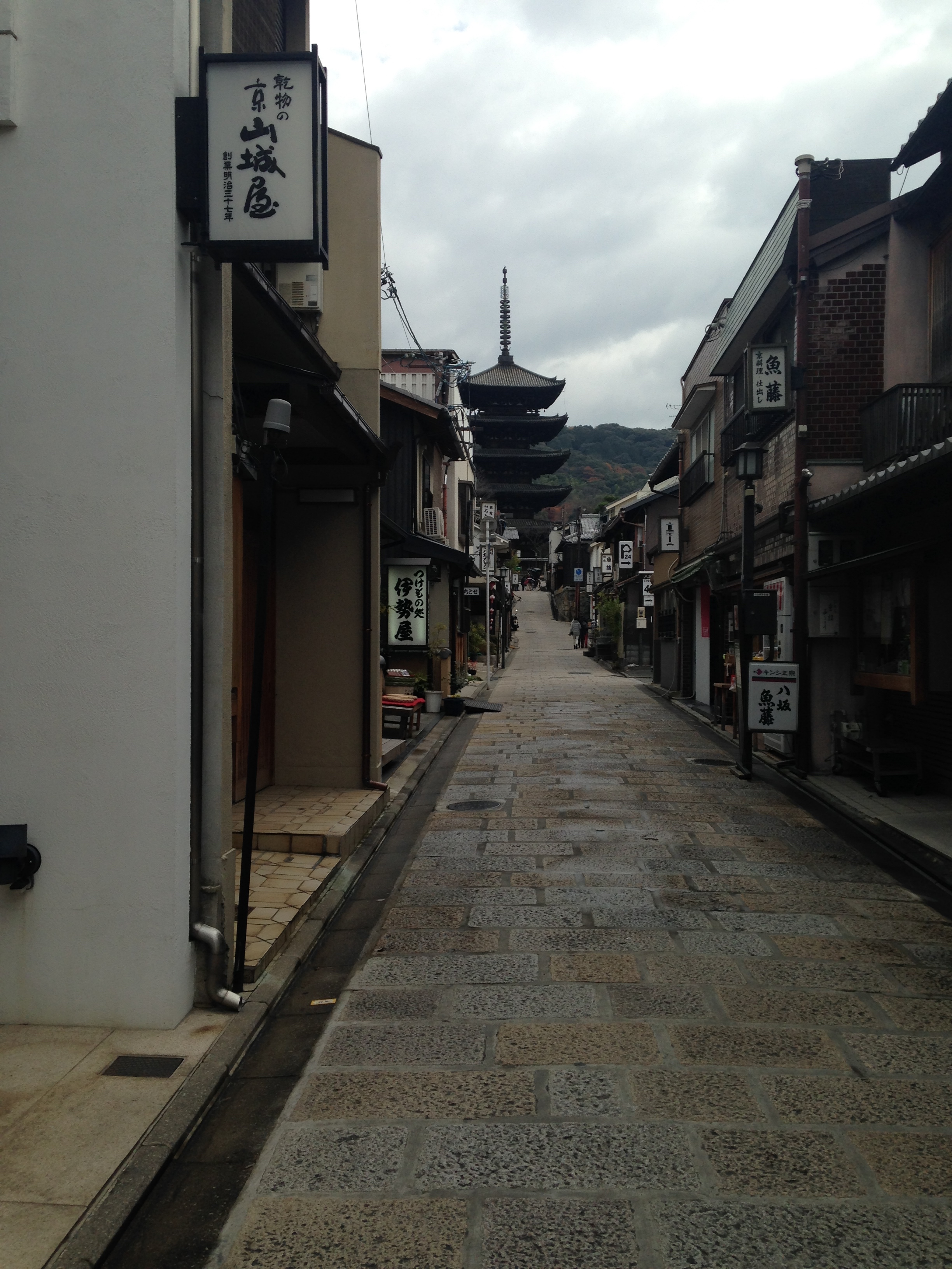 八坂通から望む八坂の塔(法観寺)